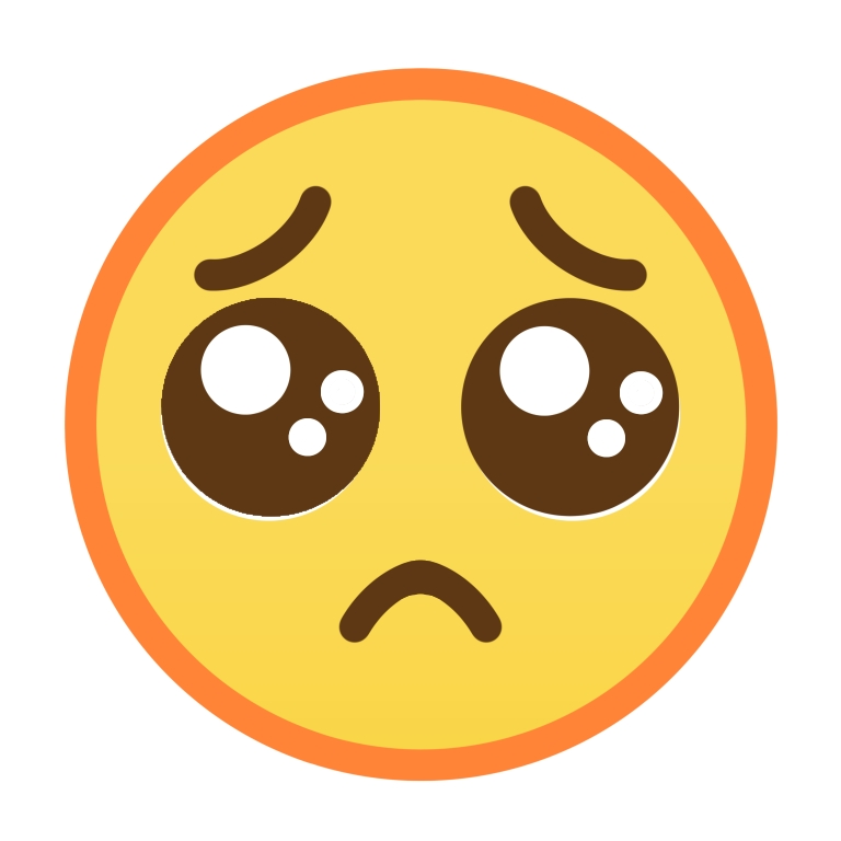 Unicode U+1F97AのPleading Faceをもとに、2010年代後半からの流行語「ぴえん」のアイコンとして認知されるようになった顔文字の一例。下がり眉、潤んだ瞳、への字に曲がった口元などの共通の特徴をもとに投稿者が作成。